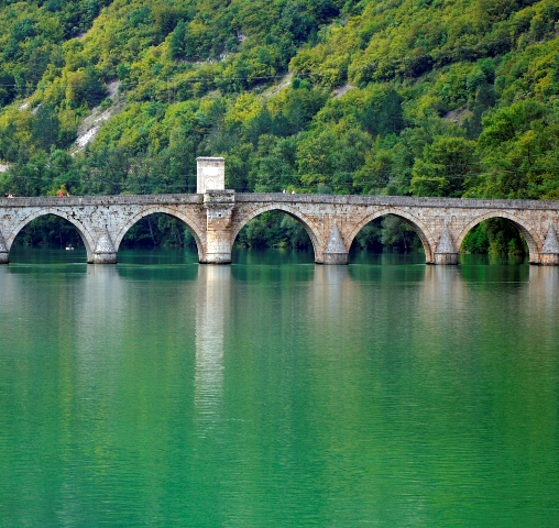 Српски (ћирилица): Višegradska ljepotica, ćuprija na Drini, čuveni most Mehmed-paše Sokolovića. Lijep sunčan dan u Višegradu.